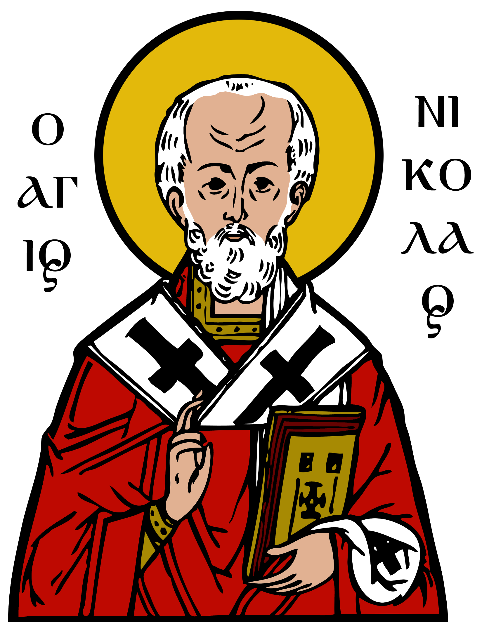 Άγιος Νικόλαος Αρχιεπίσκοπος Μύρων της Λυκίας, ο Θαυματουργός Ο άγιος Νικόλαος εικονίζεται στηθαίος, γέρων, στρογγυλογένης, σχεδόν φαλακρός, με έντονα ζυγωματικά, στον καθιερωμένο εικονογραφικό τύπο (προτομή), σε στάση μετωπική, ενδεδυμένος την αρχιερατική ενδυμασία. Φορεί ερυθρό φαιλόνιο με κολάρο, που καλύπτει το λαιμό πίσω και στα πλάγια αφήνοντας ακάλυπτο μονάχα το μπροστινό μέρος, χρυσά επιμάνικα και τεφρόλευκο ωμοφόριο κοσμημένο με μεγάλους μαύρους σταυρούς. Υψώνει το δεξί χέρι έμπροσθεν του στήθους του ευλογών, ενώ με το αριστερό κρατεί όρθιο κλειστό χρυσοποίκιλτο κώδικα ευαγγελίου. Το πάχος των σελίδων του ευαγγελίου είναι πορφυρό. Την κεφαλή του αγίου περιβάλλει εγχάρακτος φωτοστέφανος.